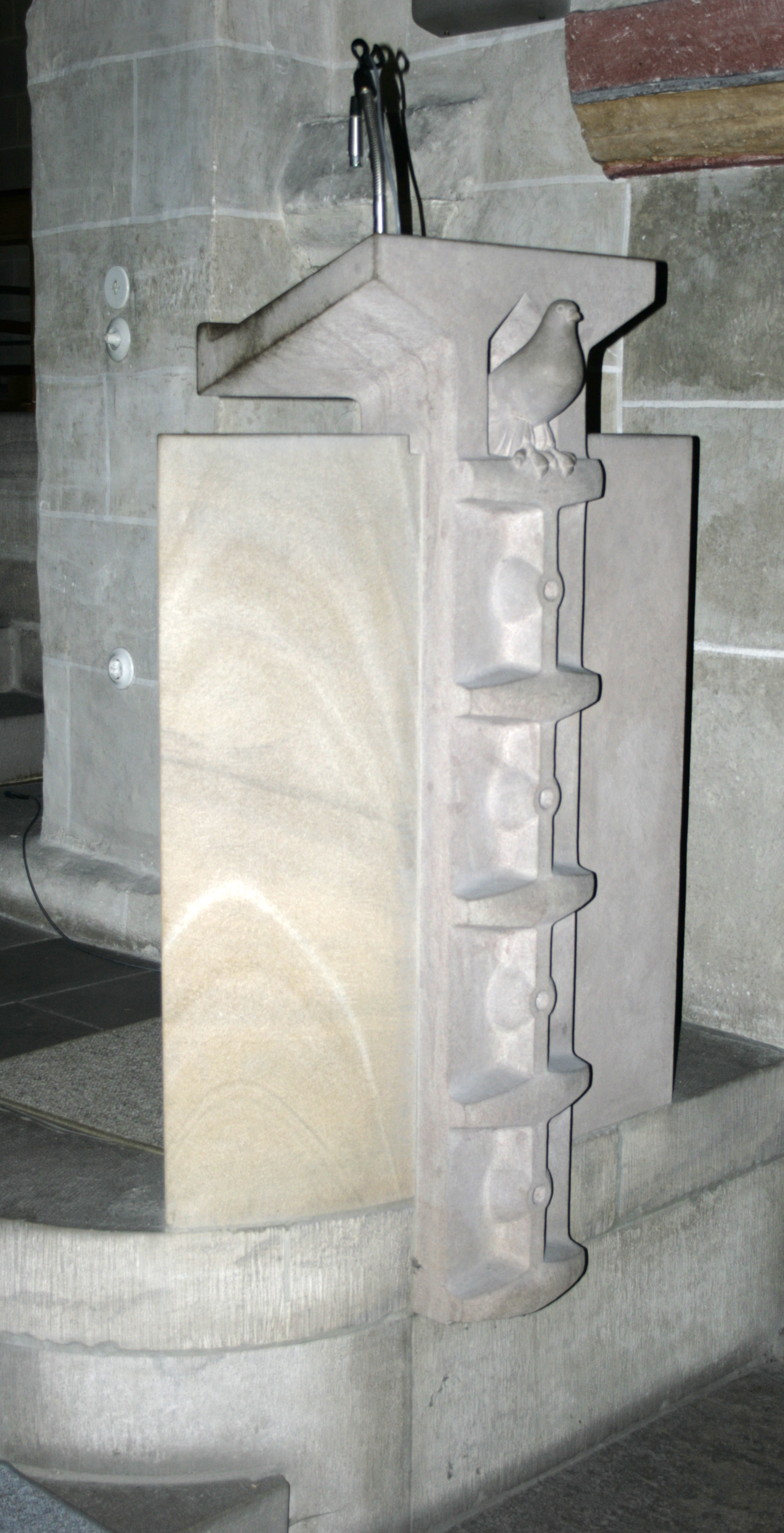 Lubentiusstift Dietkirchen, Deutschland, Lesungspult (Ambo)